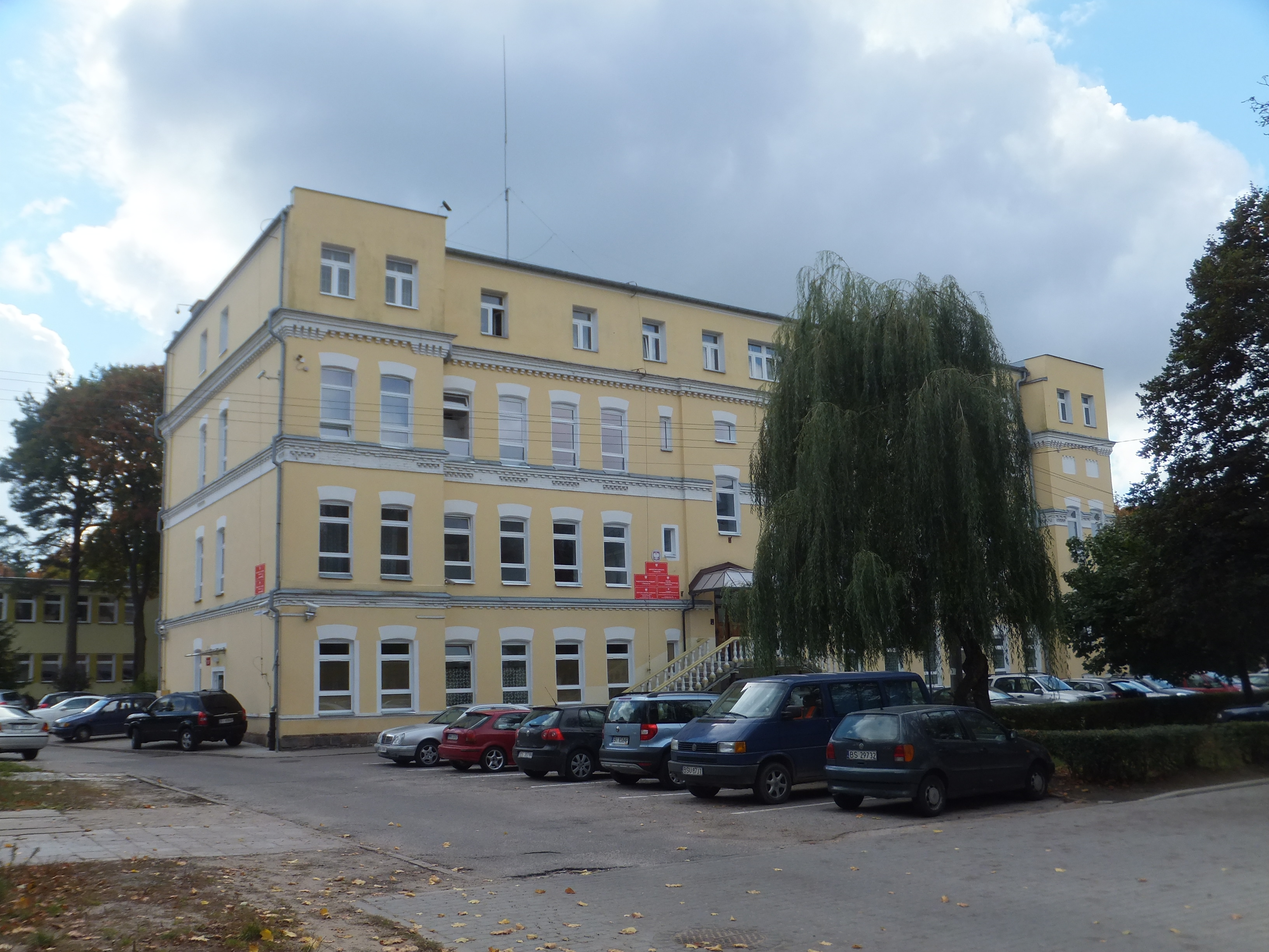 Białystok, budynek nr 3 - administracyjno-mieszkalny, ok. 1897